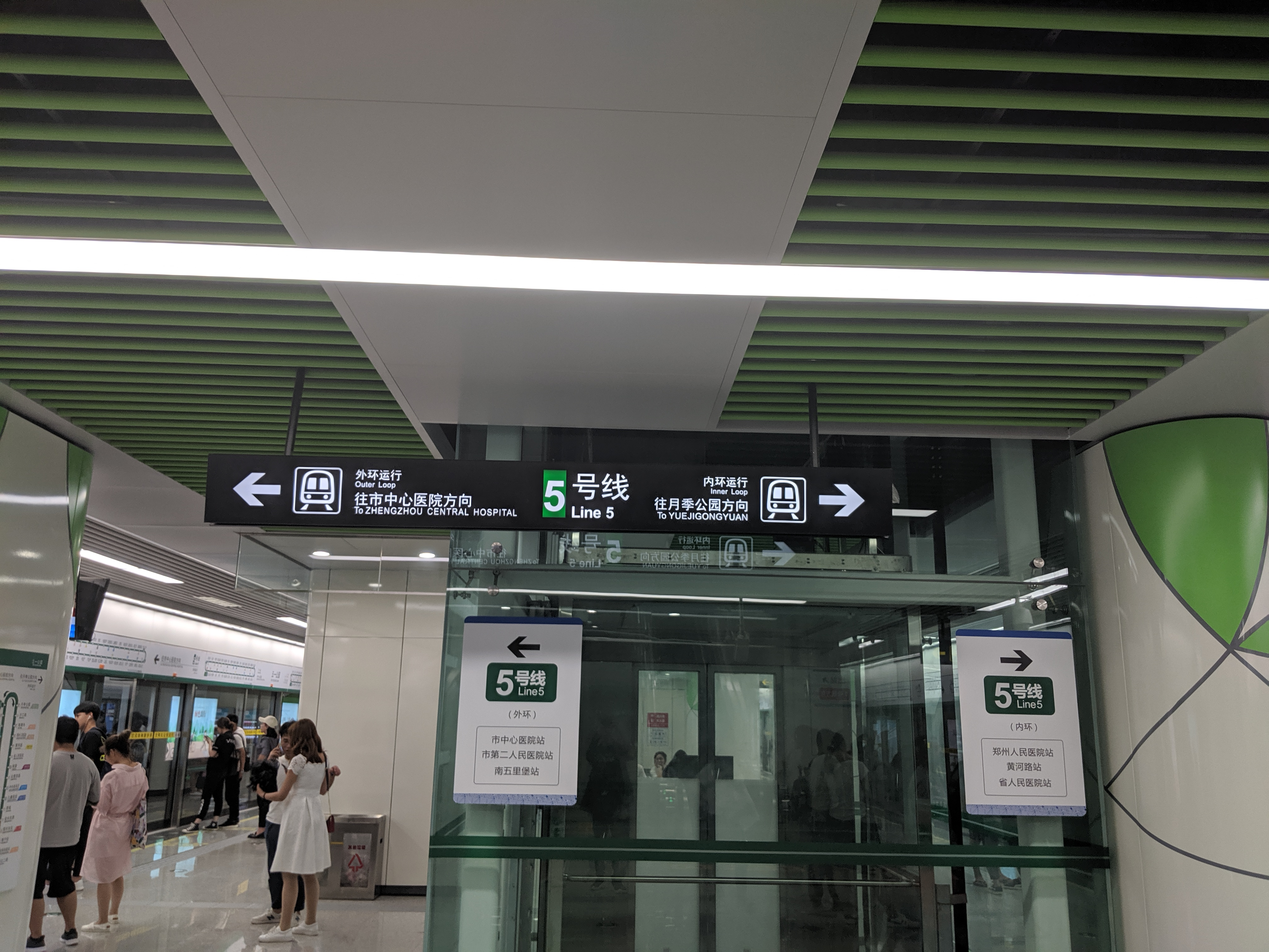 中文（中国大陆）: 五一公园站内部（5号线）